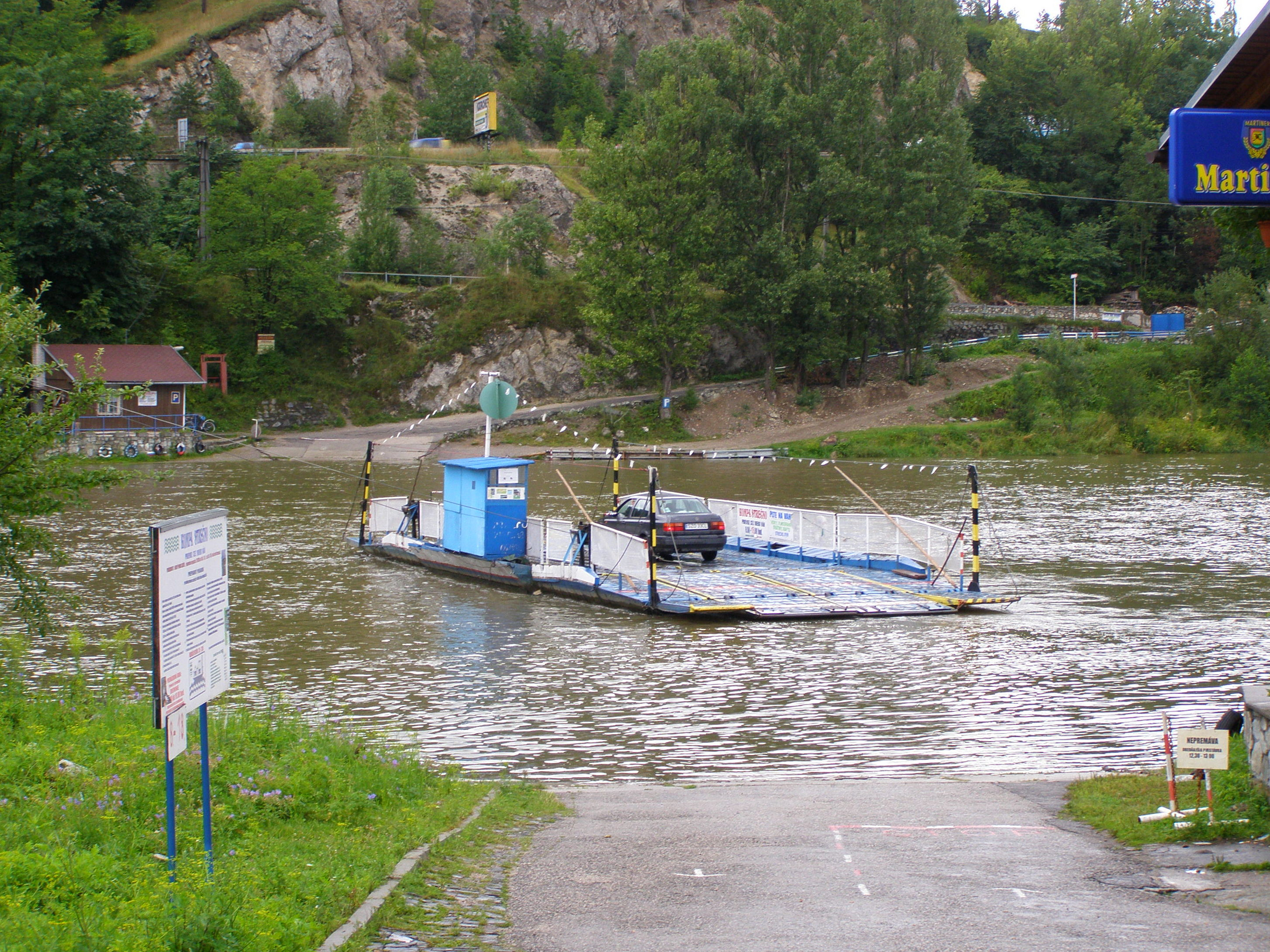 Nezbudská Lúčka, přívoz pro auta